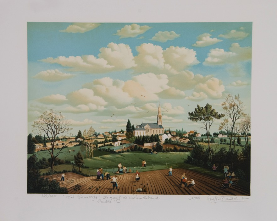 Lithographie par le peintre français Raphaël Toussaint intitulée Les semailles à Chambretaud. 55x75cm.